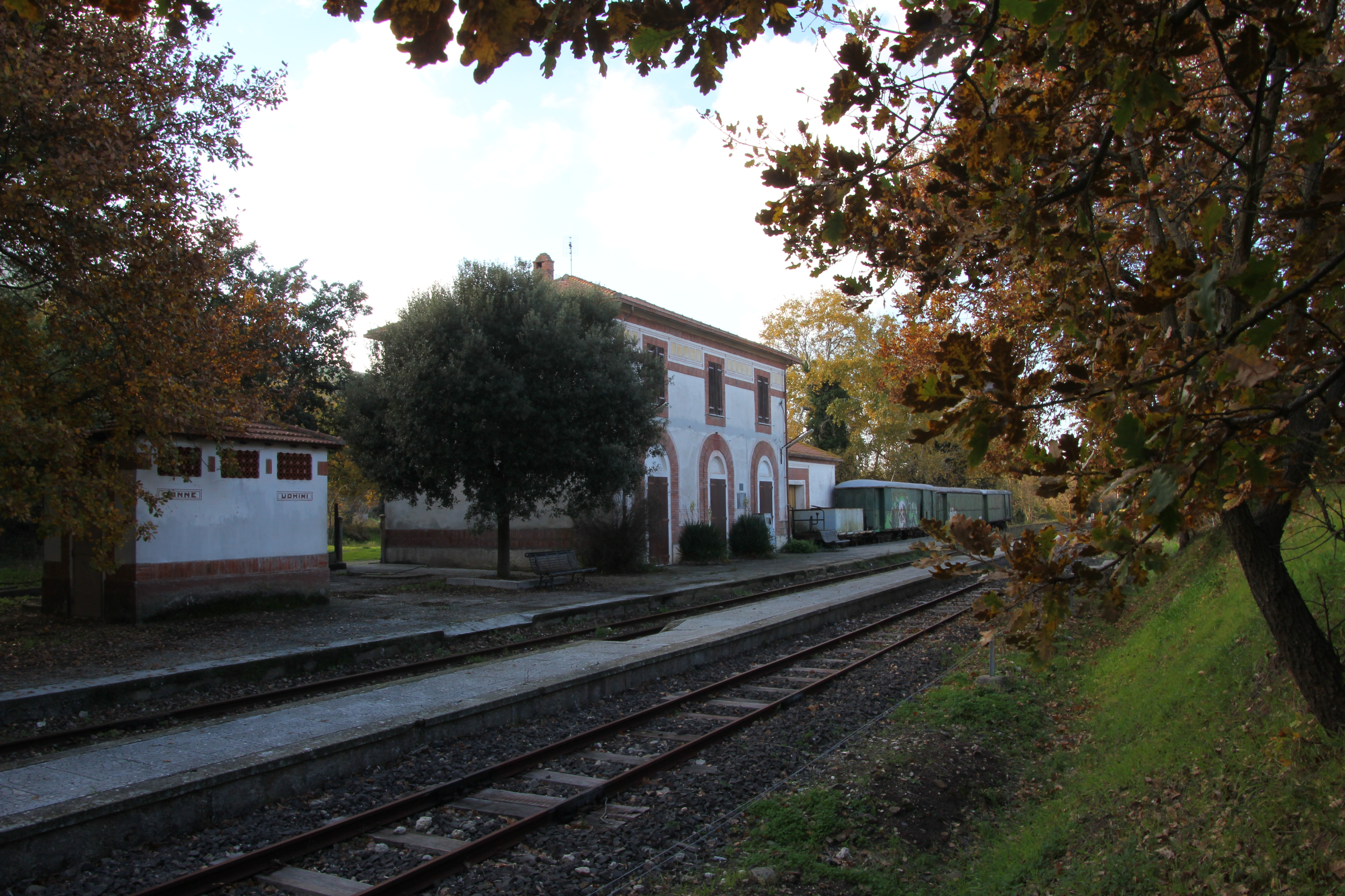 Osilo - Stazione ferroviaria